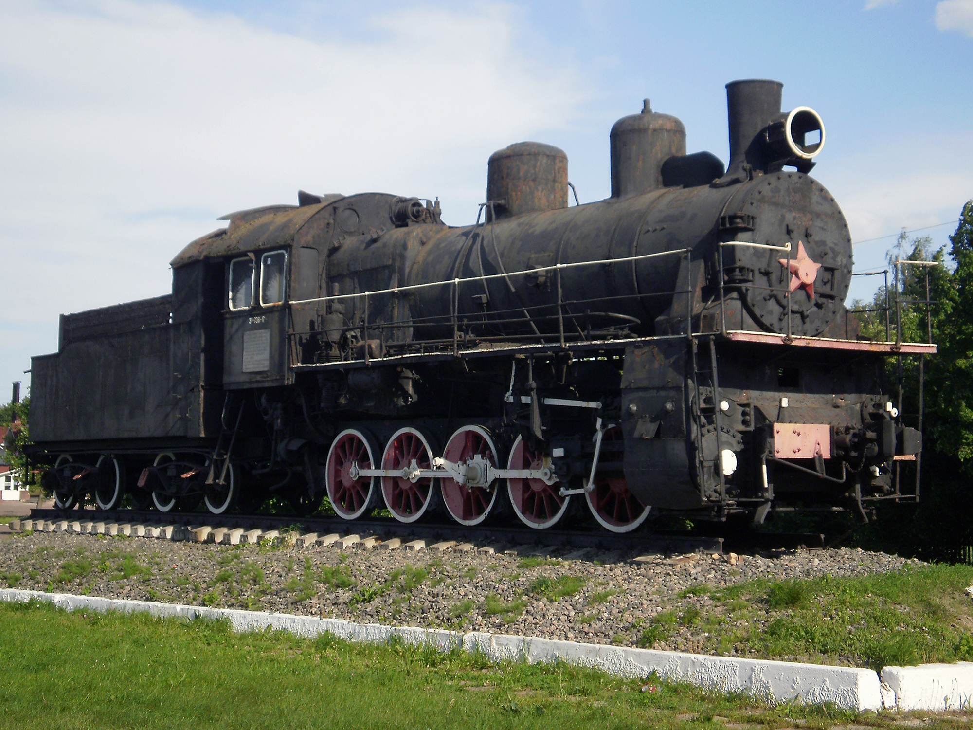 памятник установлен в 1988